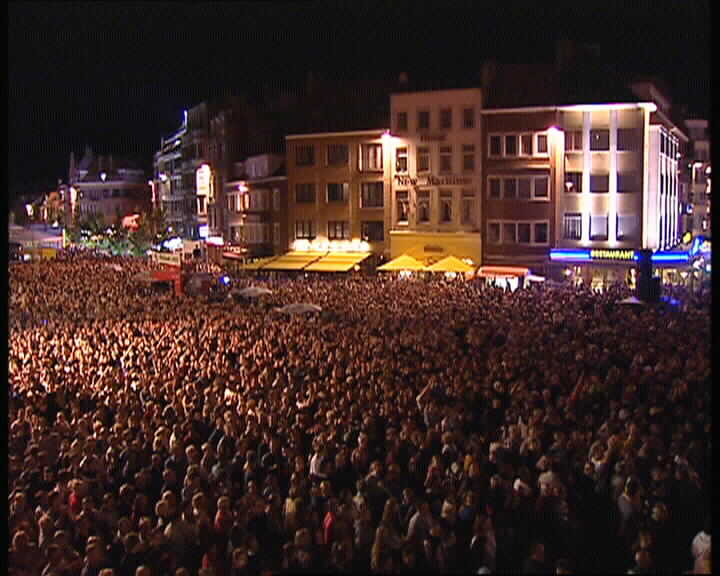 zelf gemaakt Sint-Petrus en Paulusplein in Oostende tijdens de Paulusfeesten